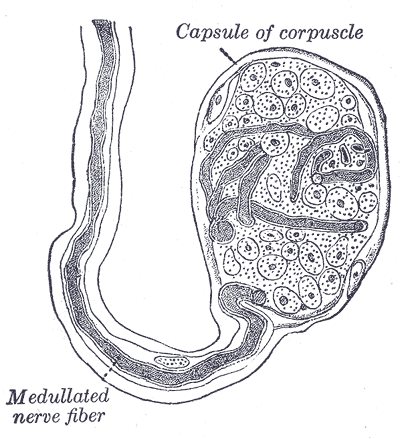 End-bulb of Krause. (Klein.)